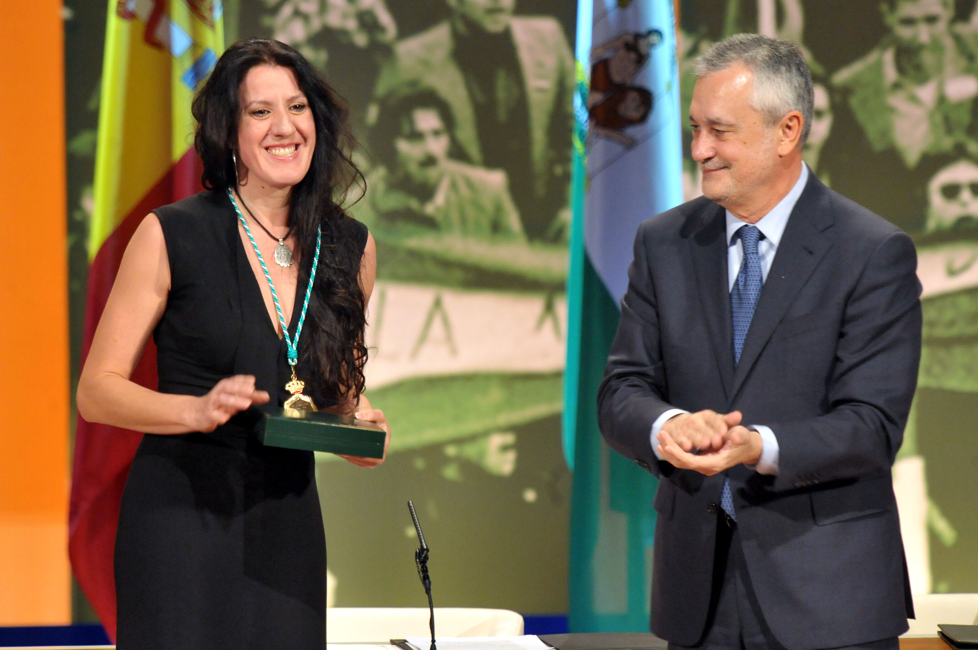 La bailaora y coreógrafa María Pagés recibe la Medalla de Andalucía de manos del presidente andaluz, José Antonio Griñán.